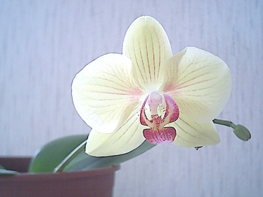 Phalaenopsis hybride